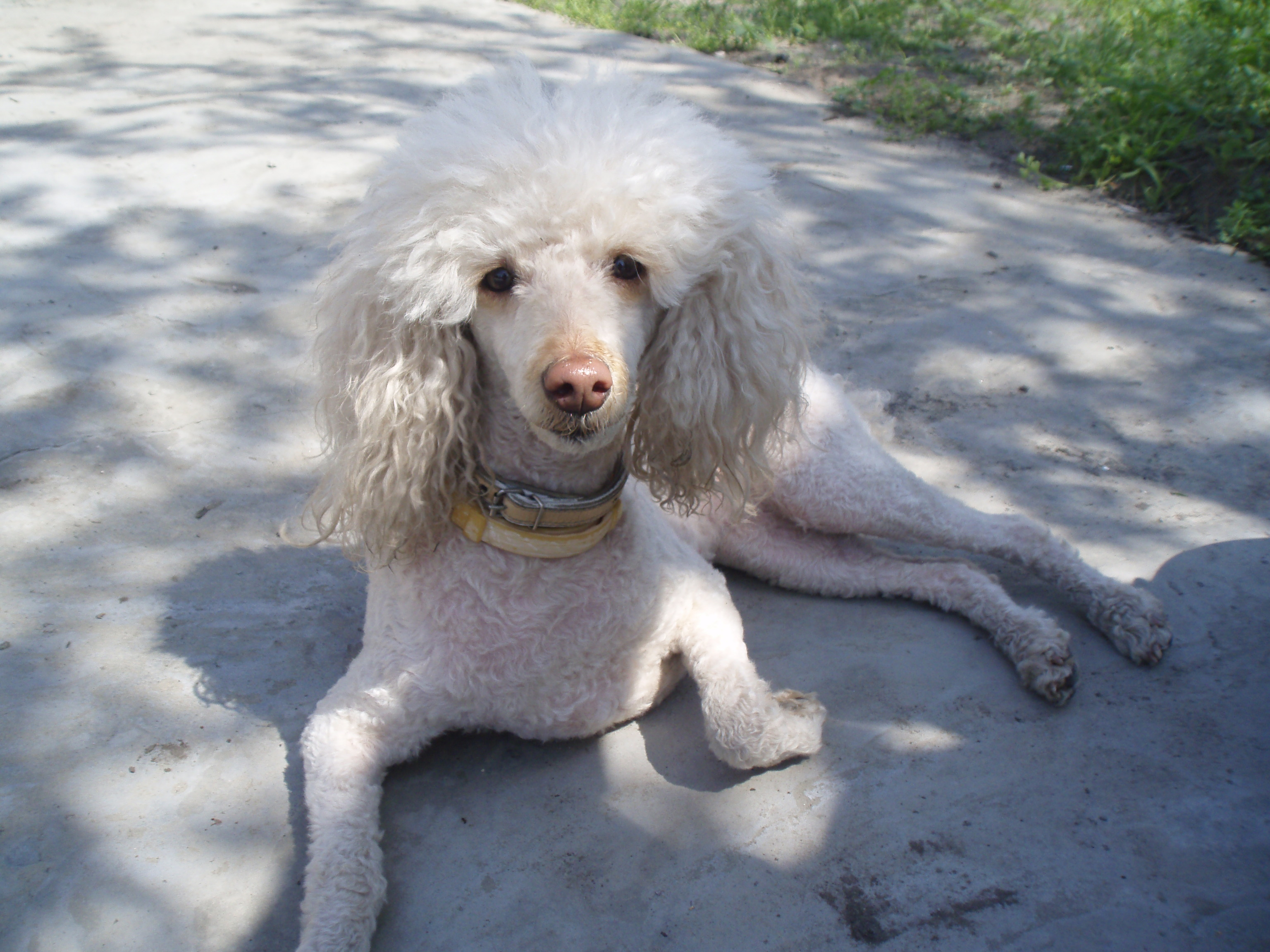 Белый пудель